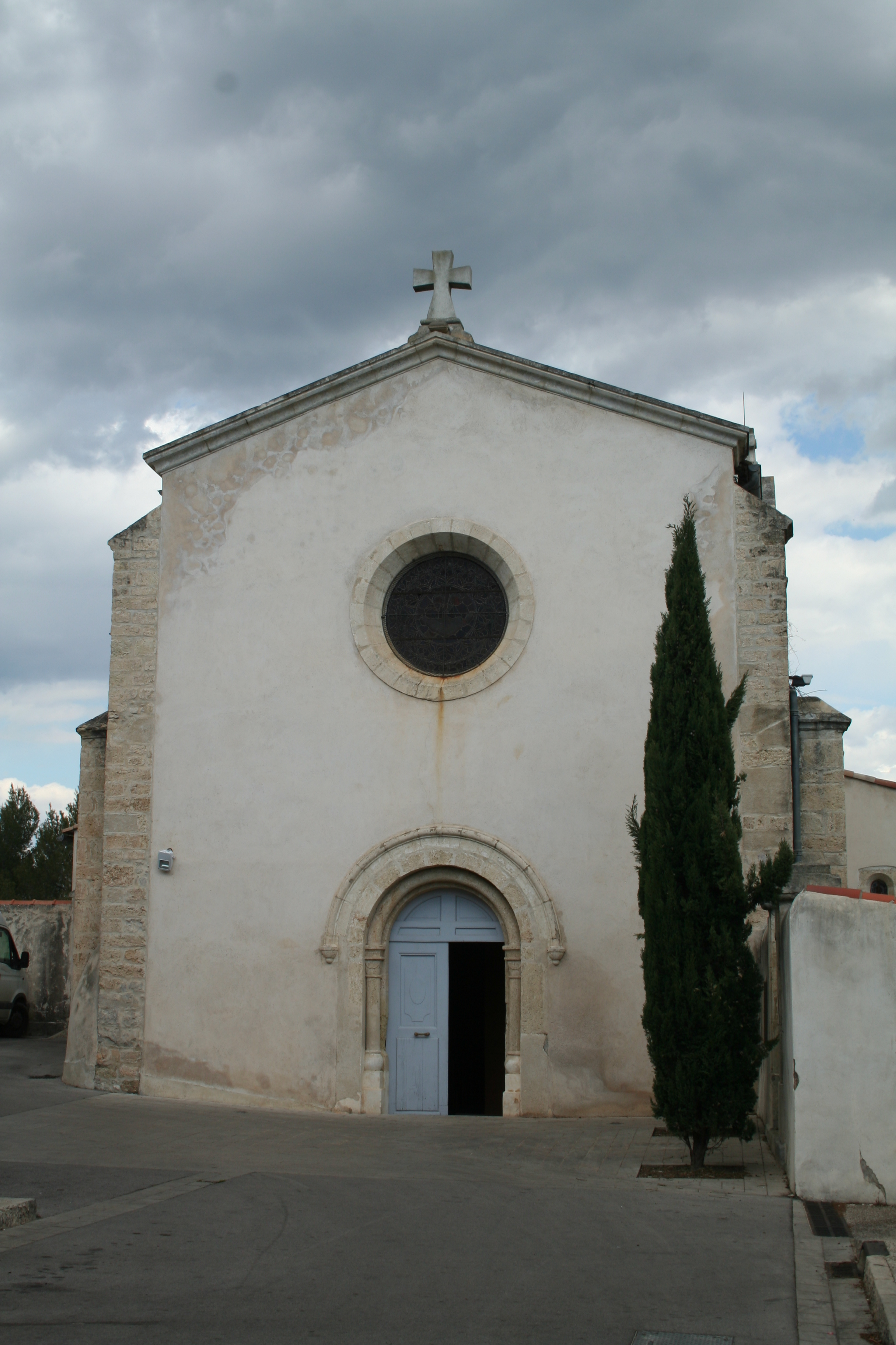 Cournonsec (Hérault) - façade ouest de l'église Saint-Christophe.